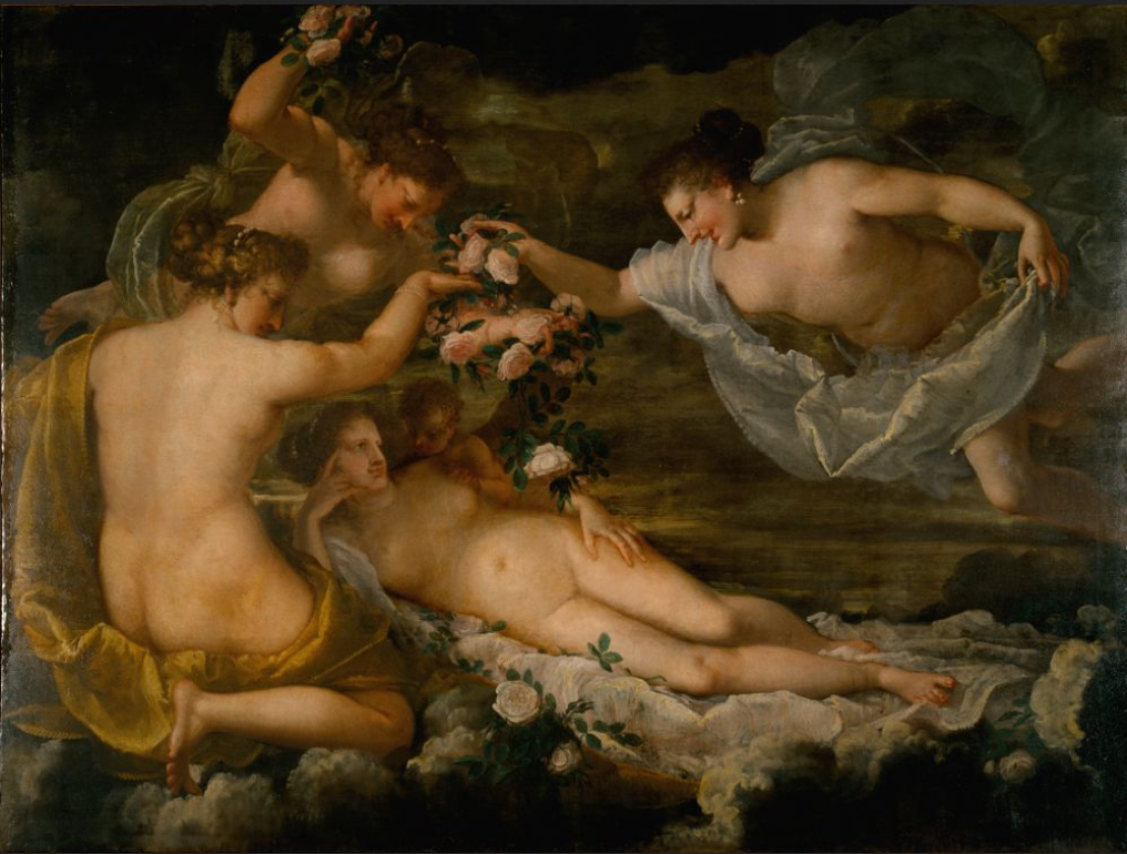 Venus adorada por las Graciaslabel QS:Les,"Venus adorada por las Gracias"